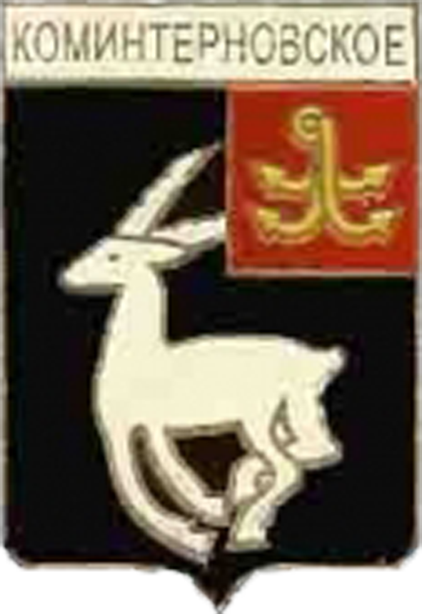 Герб смт Комінтернівське Одеської області радянських часів